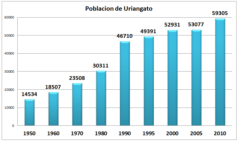 Población de Uriangato